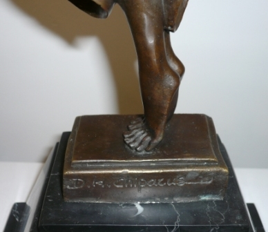 "La Danseuse" - CHIPARUS